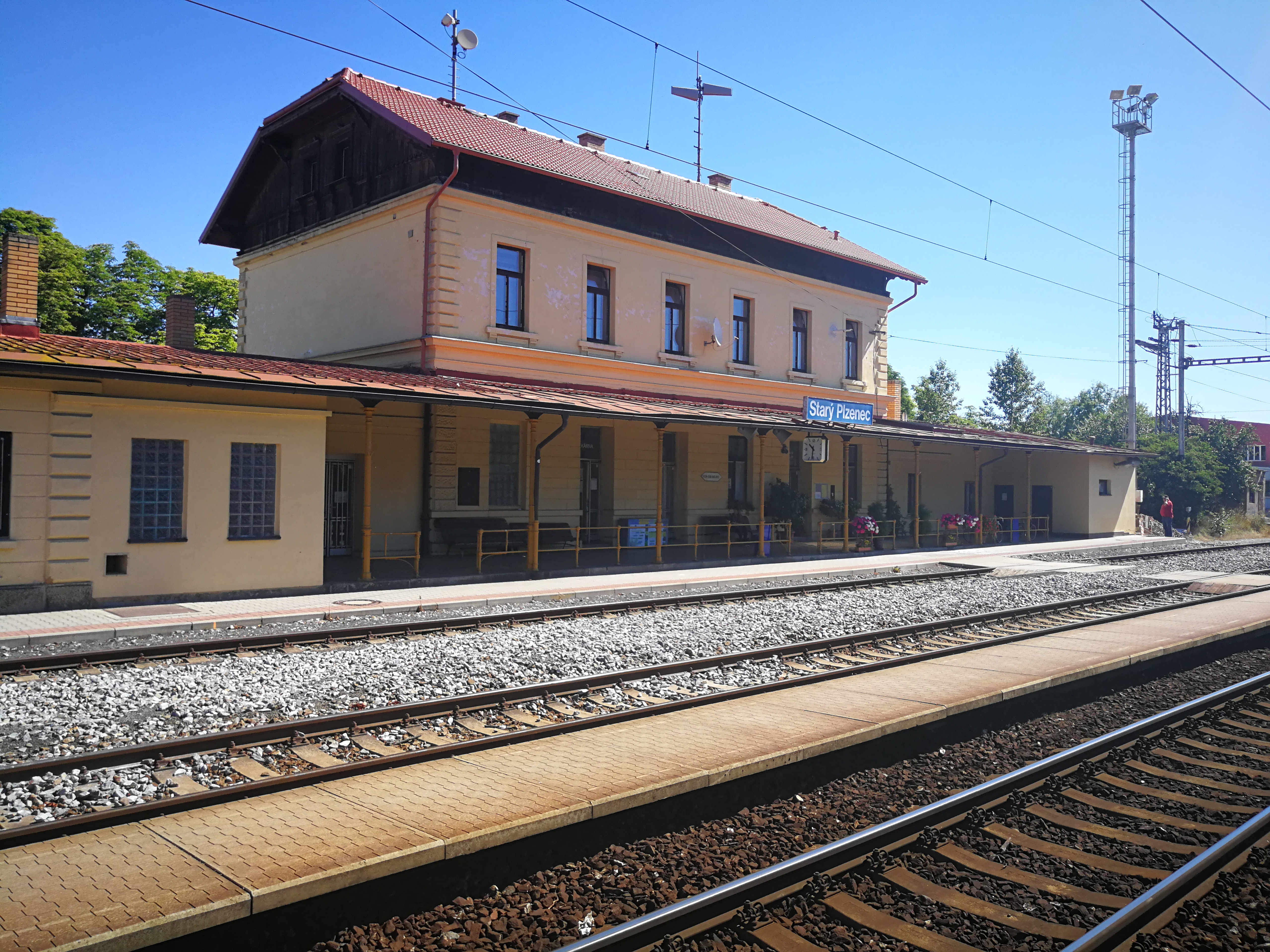 Starý Plzenec (železniční stanice)